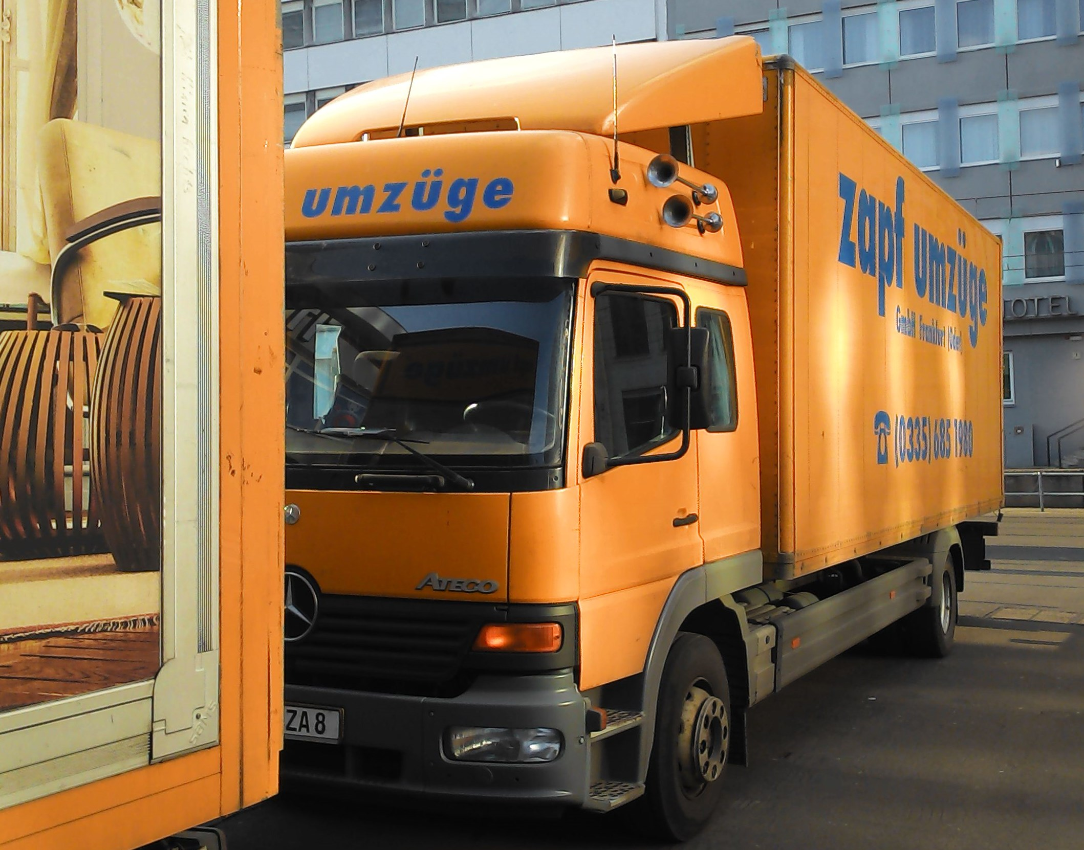 zapf umzüge AG, 1975 gegründete internationale Umzugsfachspedition mit Sitz in Berlin und Filialen in sieben weiteren Städten. Umzug mit Zapf am Alexanderplatz in Berlin.